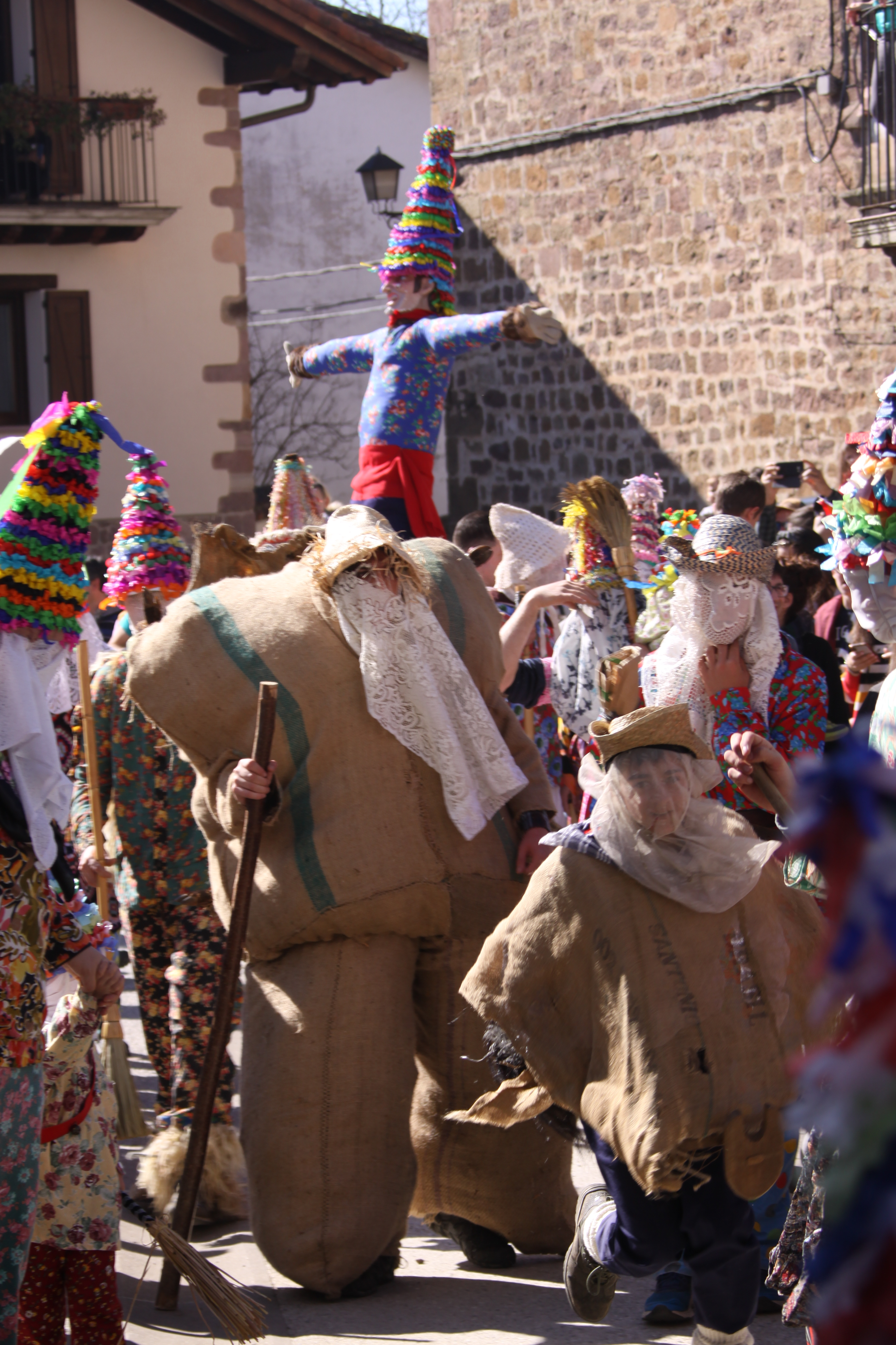 Ziripot, Zaldiko au milieu des Txatxus précèdent Miel Otxin